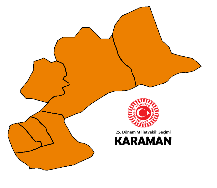 2015 genel seçim sonuçları